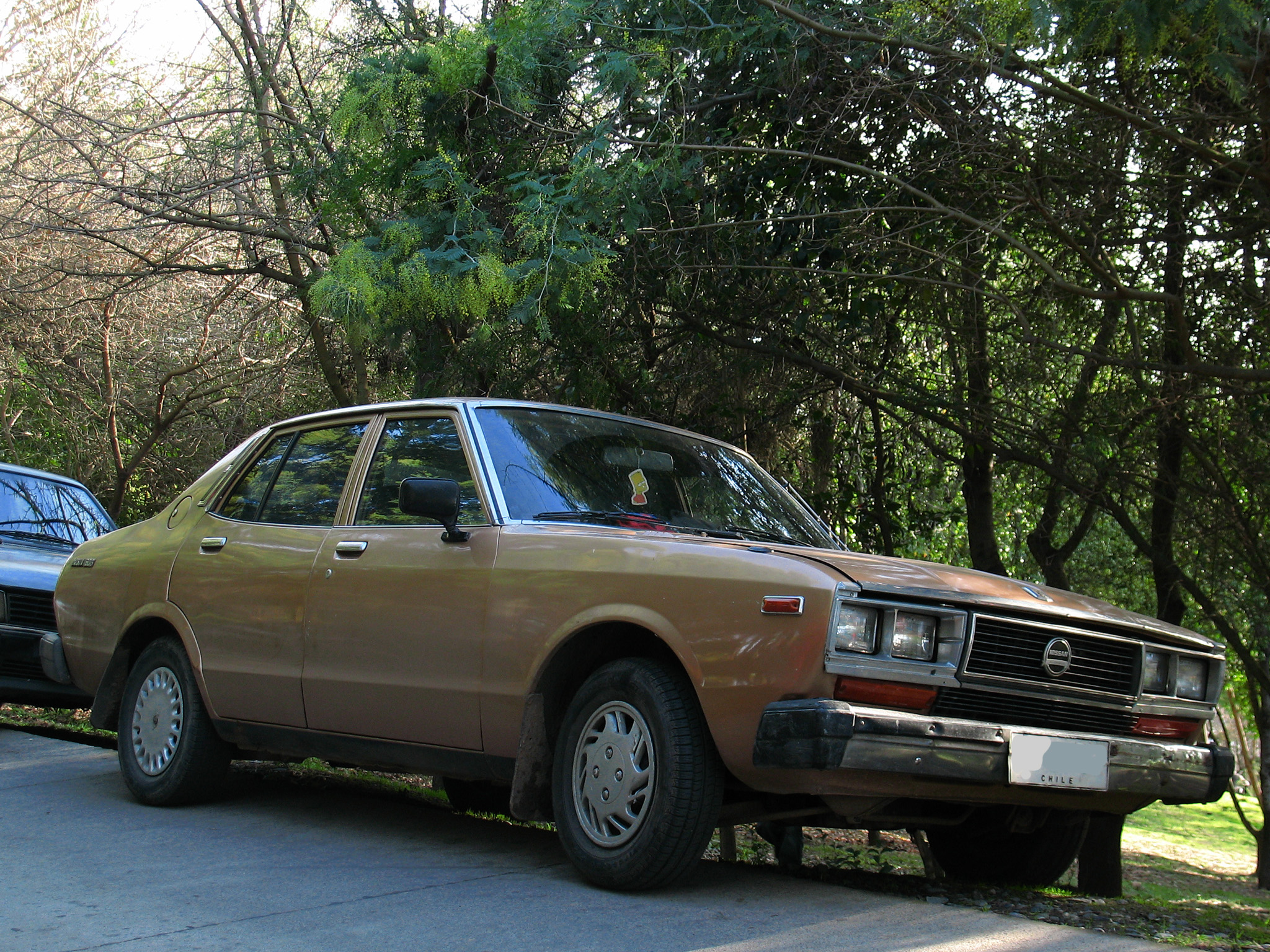 Datsun 180 B 1980